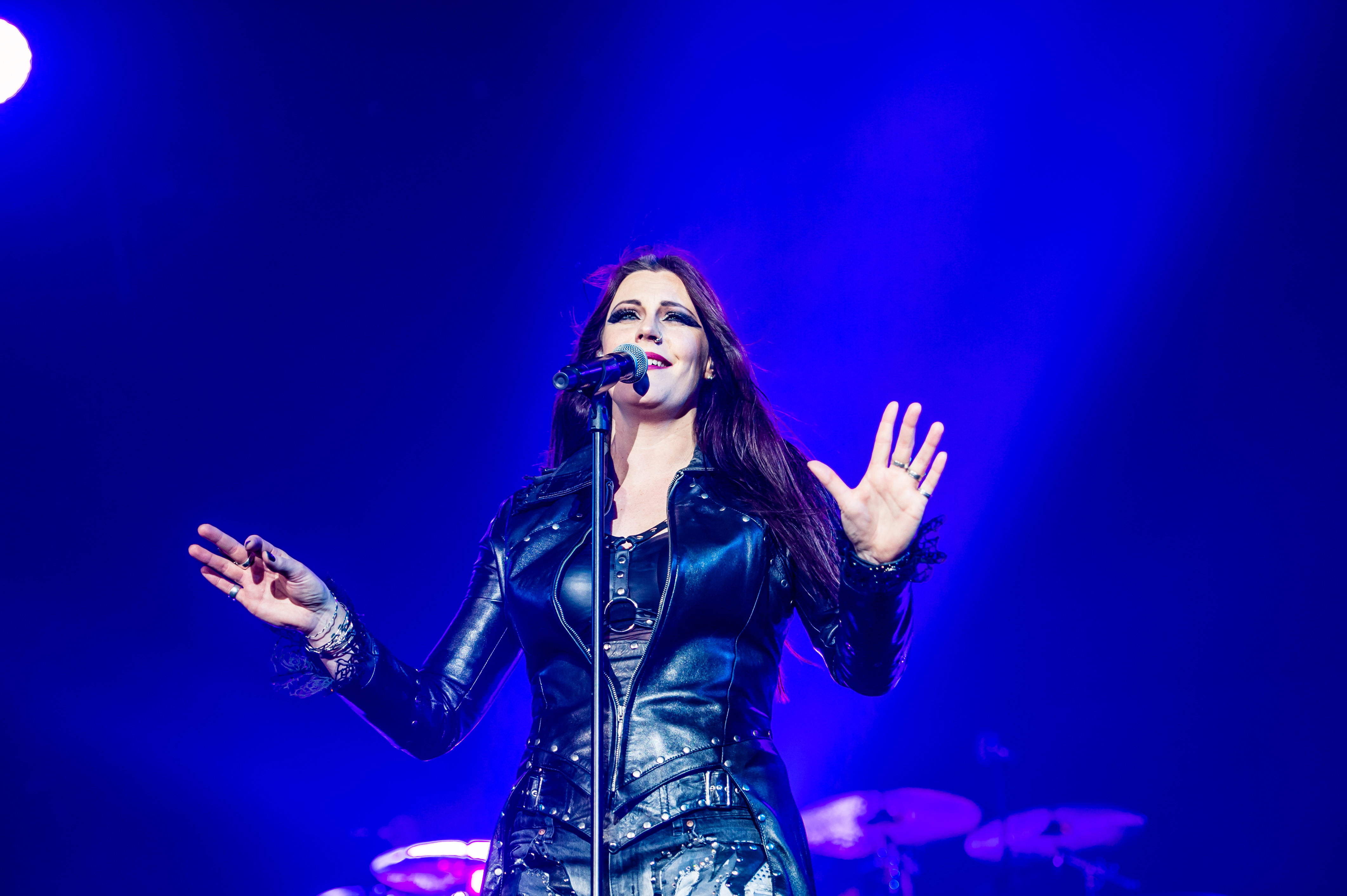 'Nightwish Endless forms most beautiful Tour 2015 Oberhausen'